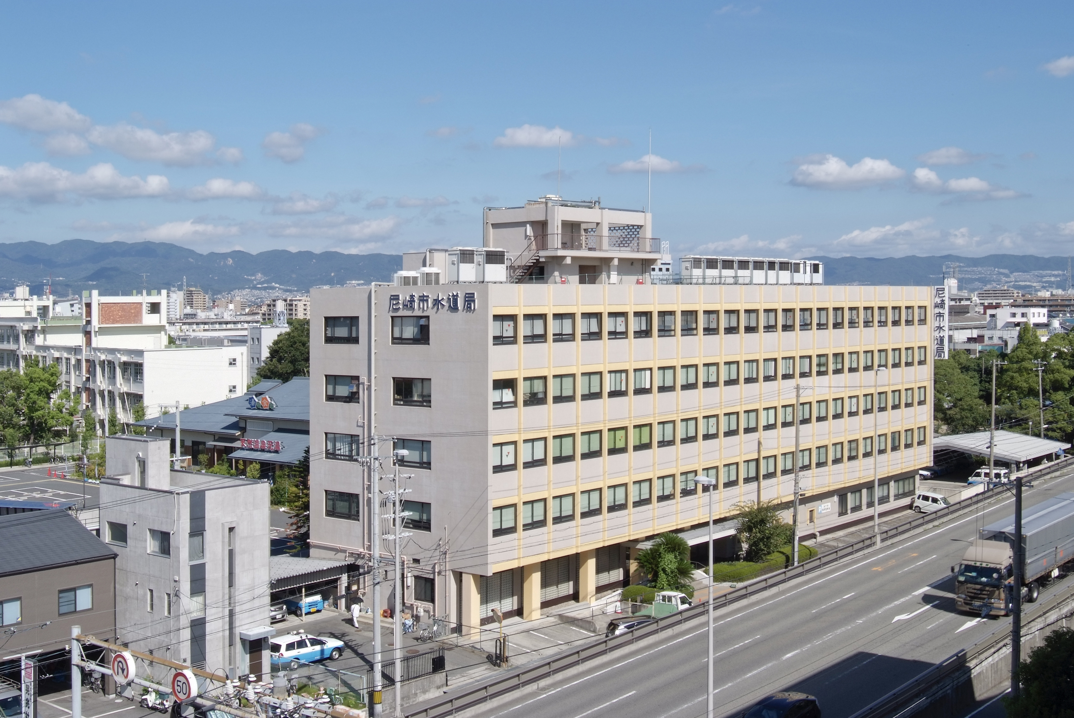 尼崎市水道局本庁舎